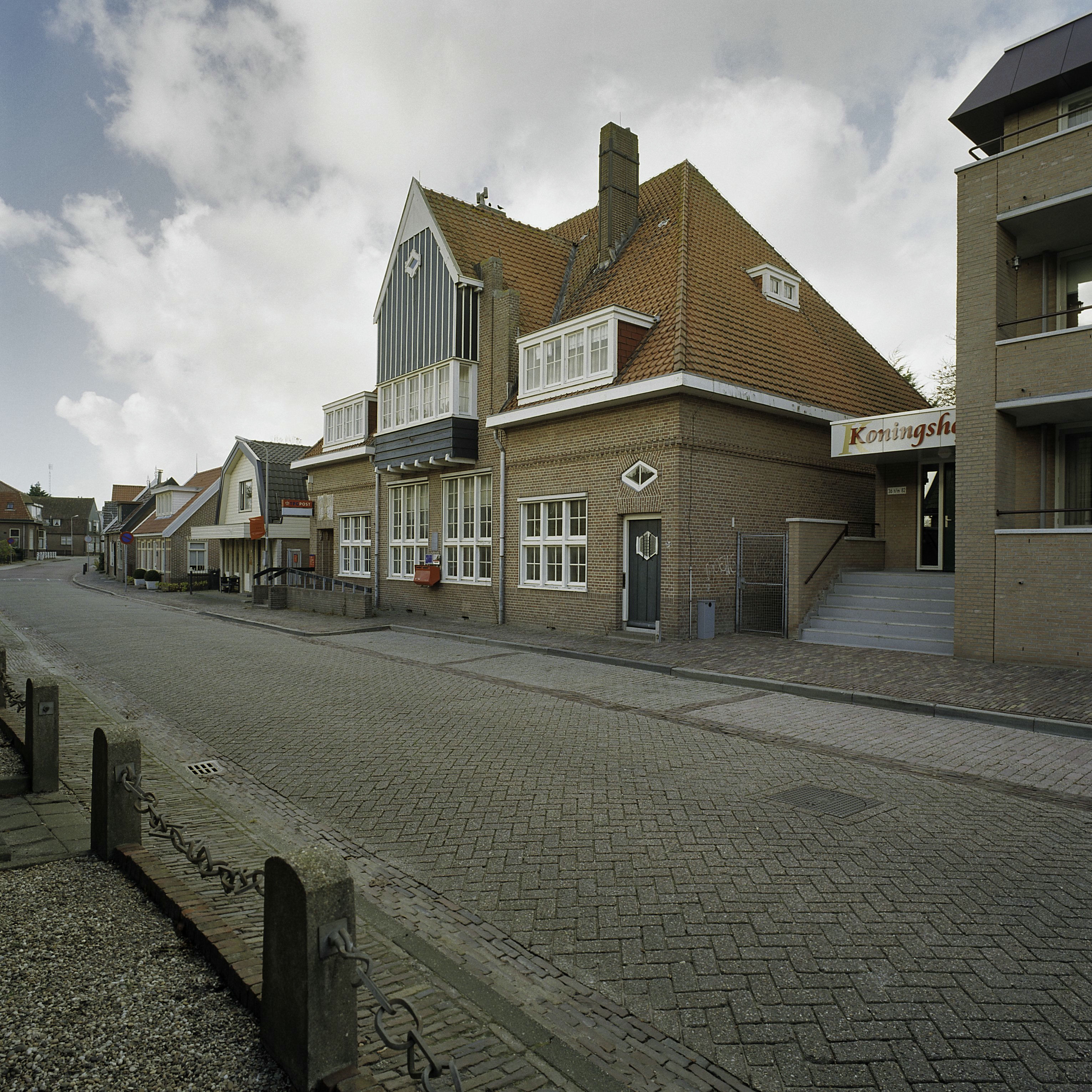 Postkantoren: Postkantoor, overzicht voorgevel en rechter zijgevel (opmerking: Gefotografeerd voor Monumenten In Nederland Noord-Holland)